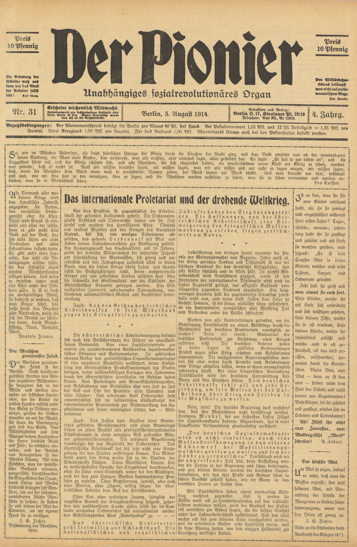 August 5, 1914 of Der Pionier